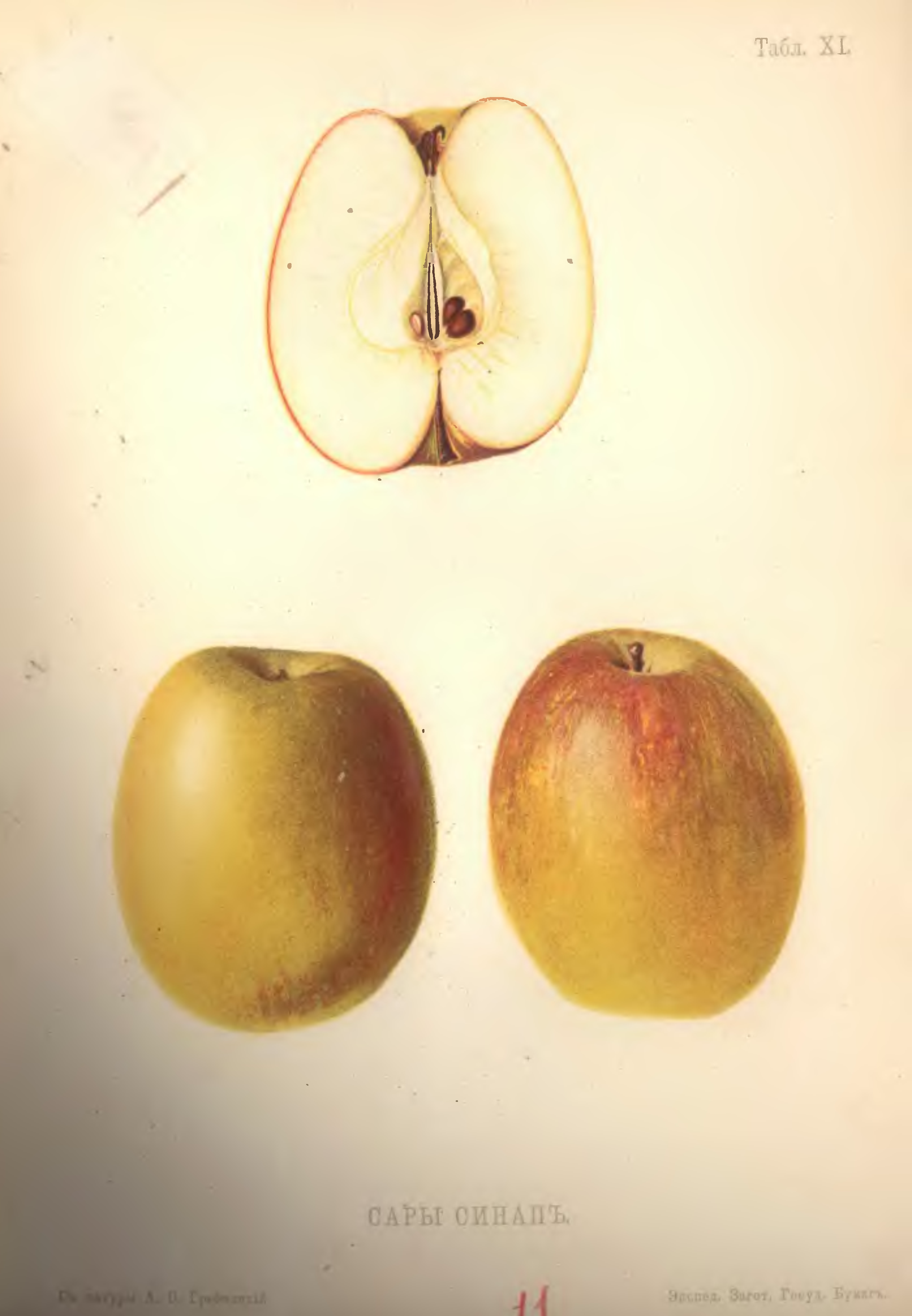 Сары Синап